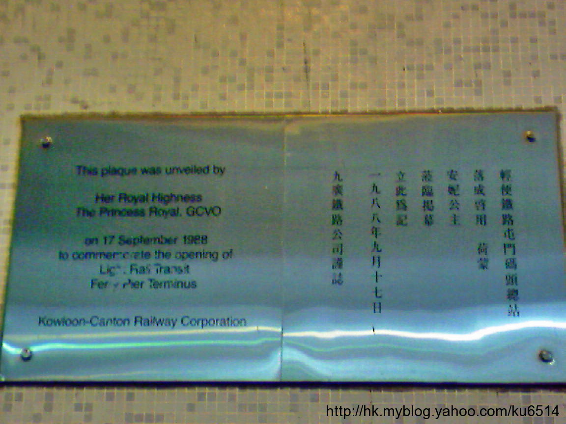 中文（香港）: 屯門碼頭總站的輕鐵通車紀念牌匾，位於屯門碼頭總站1號月台。